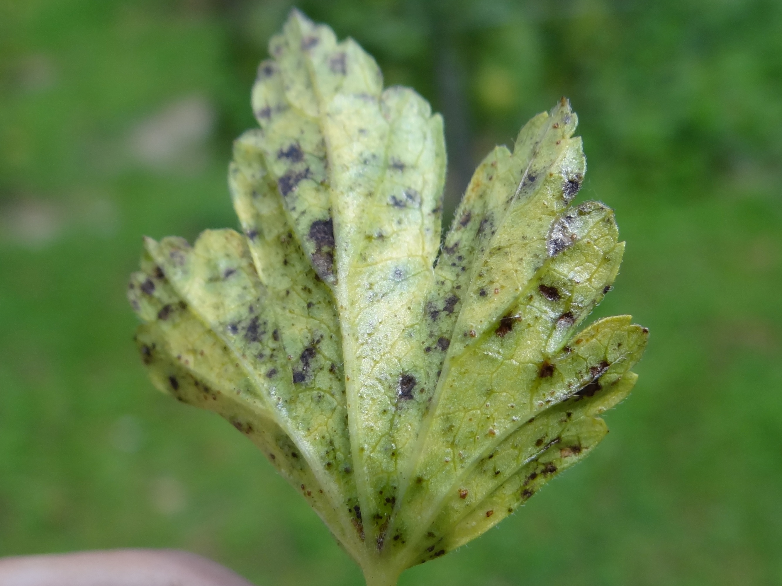 Drepanopeziza ribis on Ribes uva-crispa